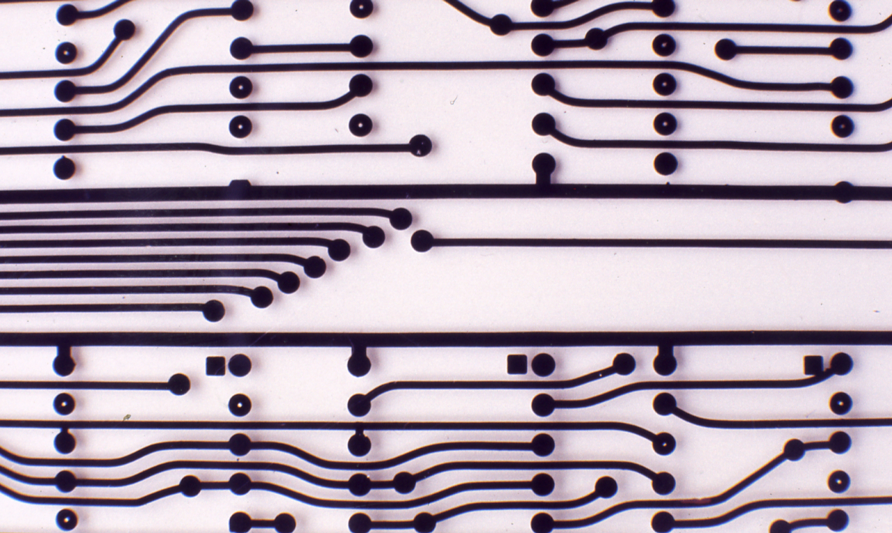 Lombardia, Milano? Circuiti elettrici. Stabilimento industriale. Interno: operai al lavoro. Servizio fotografico : Milano, 1980 / Paolo Monti. - Foglio: 1, Fotogrammi complessivi: 3/20 : Diapositiva, sviluppo cromogeno/ pellicola ; 35 mm. - ((Nella rubrica denominata "Diapositive 24x36mm" in riferimento al foglio (n. 391) in cui sono contenute le diapositive (nn. 01-20) annotazione manoscritta: "Case rurali". - Confronto con i negativi (b/n - gelatina bromuro d'argento/ pellicola - 35mm): 3919L25-37 e 3922L01A-21A?. - Le diapositive nn. 01-15, 17 e 19-20 costituiscono altre serie. - Fonte: Rubrica di Paolo Monti: Diapositive 24x36mm (1948-1982), presso Archivio Paolo Monti. Rubrica con elenco soggetti e numeri di inventario (da 1 a 1000) corrispondenti ai fogli a tasche in pvc in cui sono contenute le diapositive.